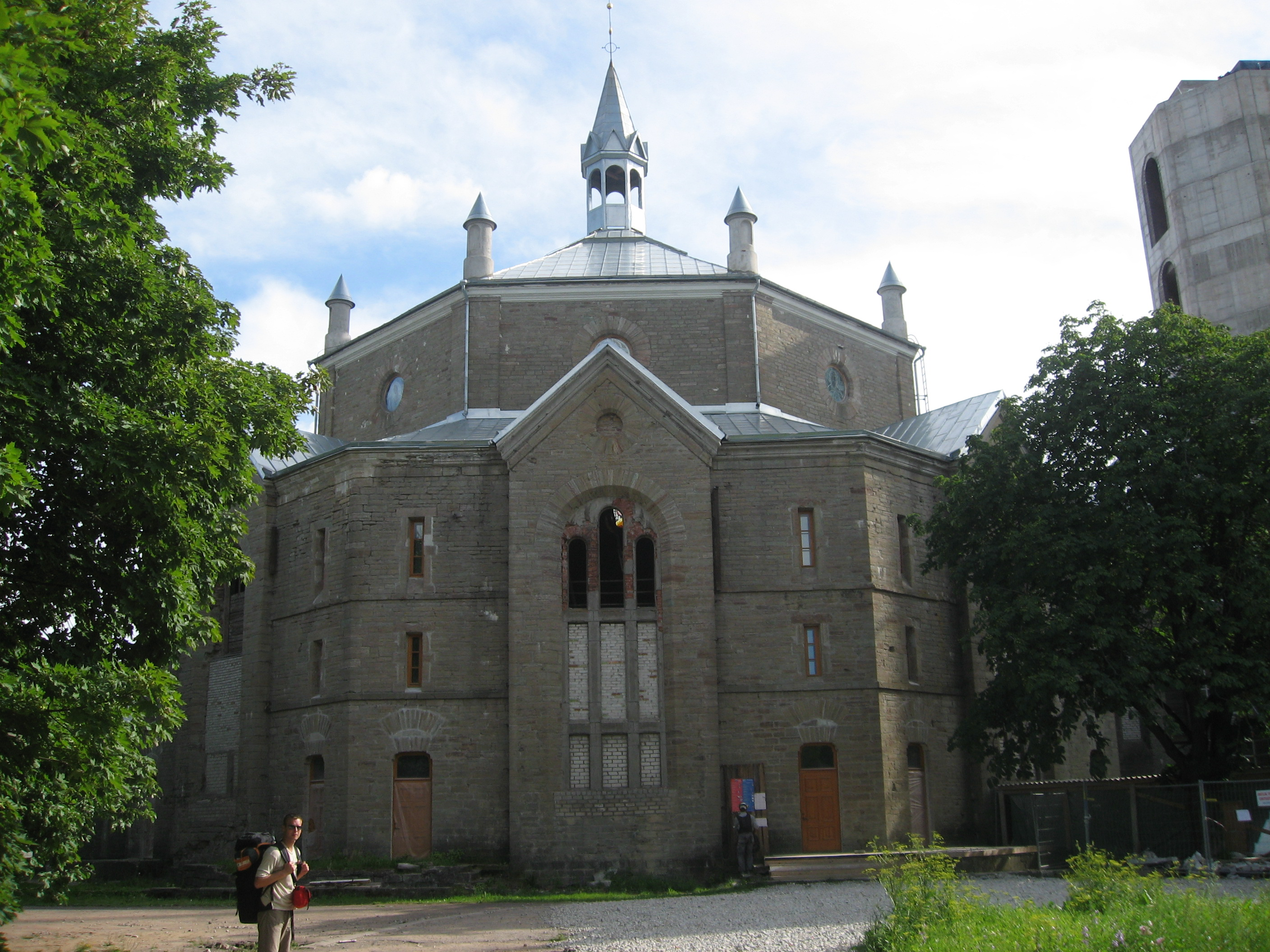 Narva, luteránský kostel svatého Alexandra